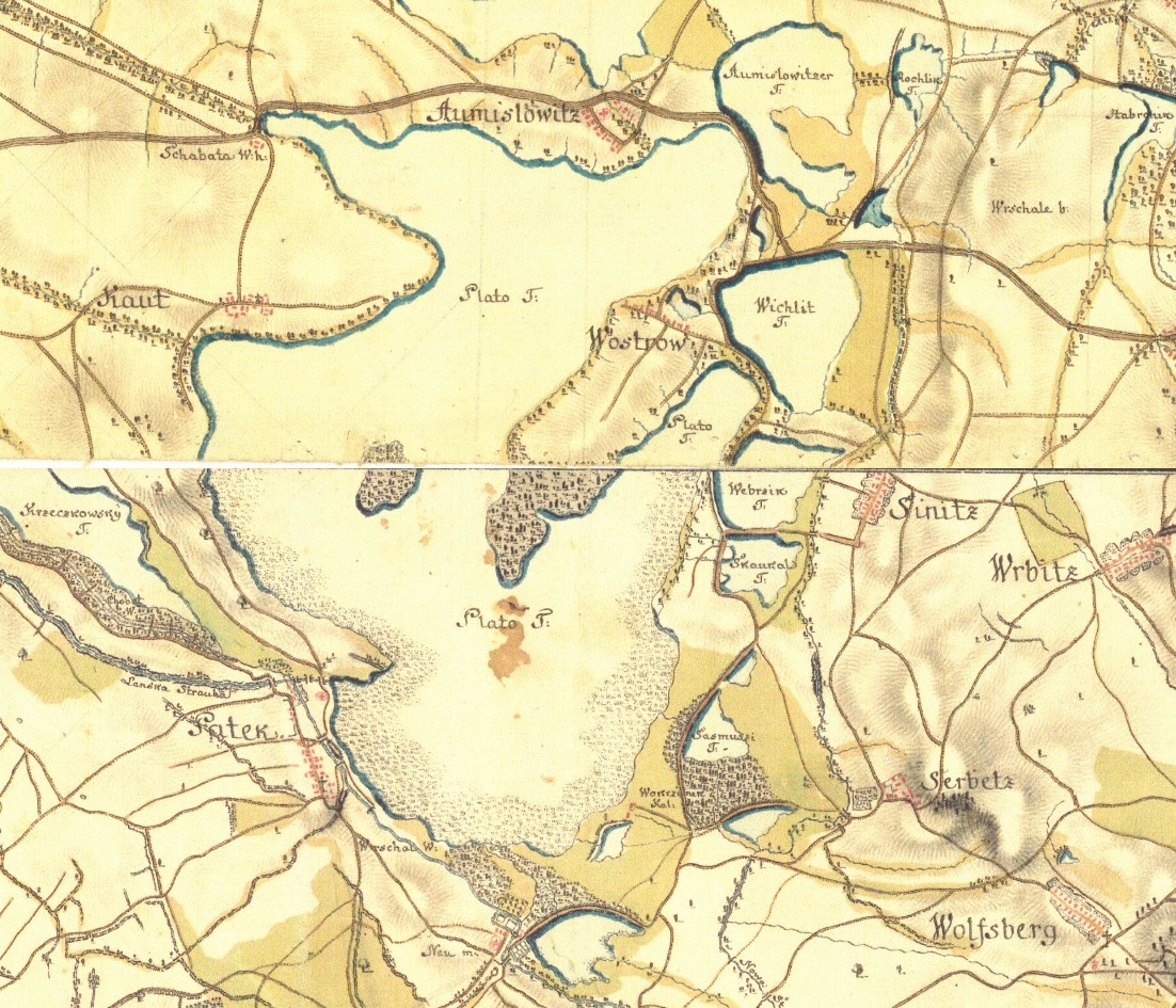 Rybník Blato u Poděbrad - I. vojenské mapování – josefské (1764–1768, 1780–1783). Měřítko 1: 28 800